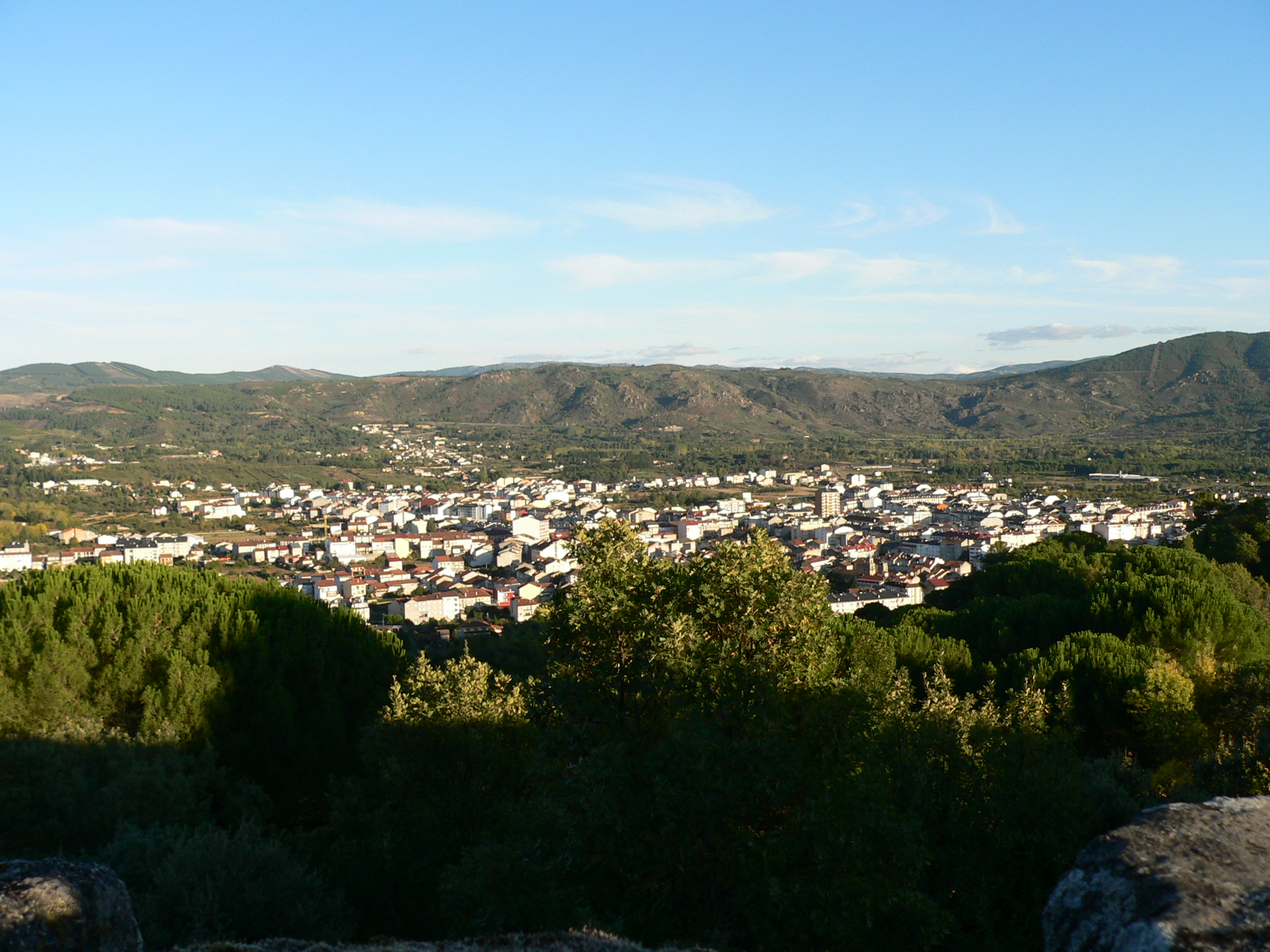 Verin, seen from Castelo de Monterrei